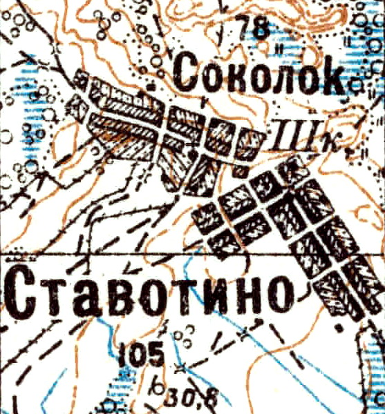 Топографическая карта Ленинградской области, квадрат VIc-26 (Ставотино), деревня Ставотино